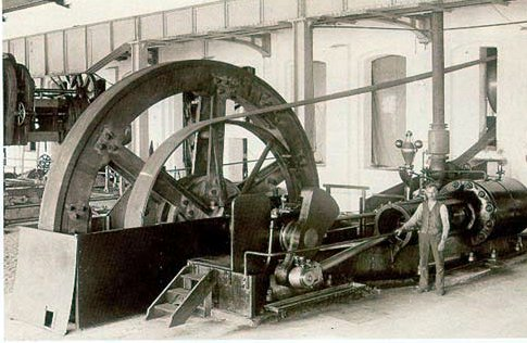 Erste Dampfmaschine in der Dillinger Hütte